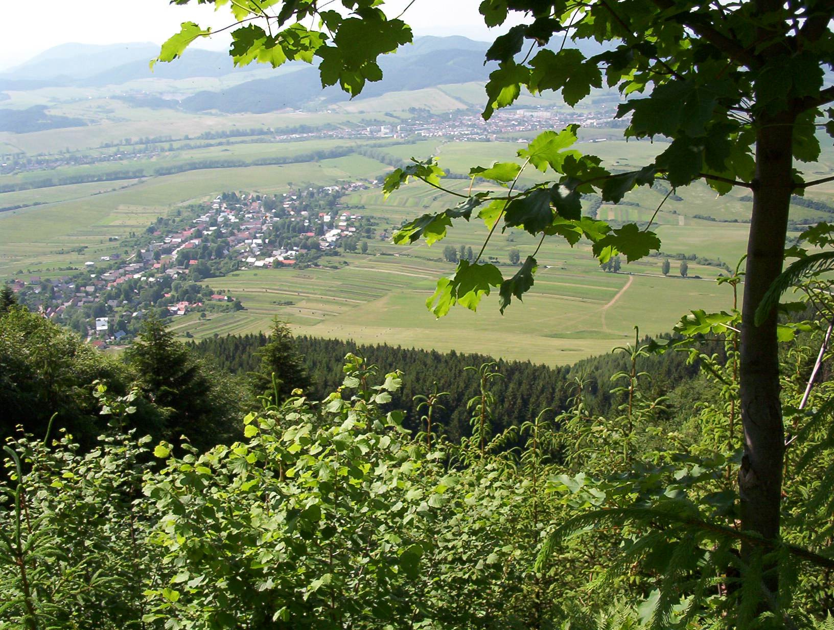 Pohľad na obec Ďurciná